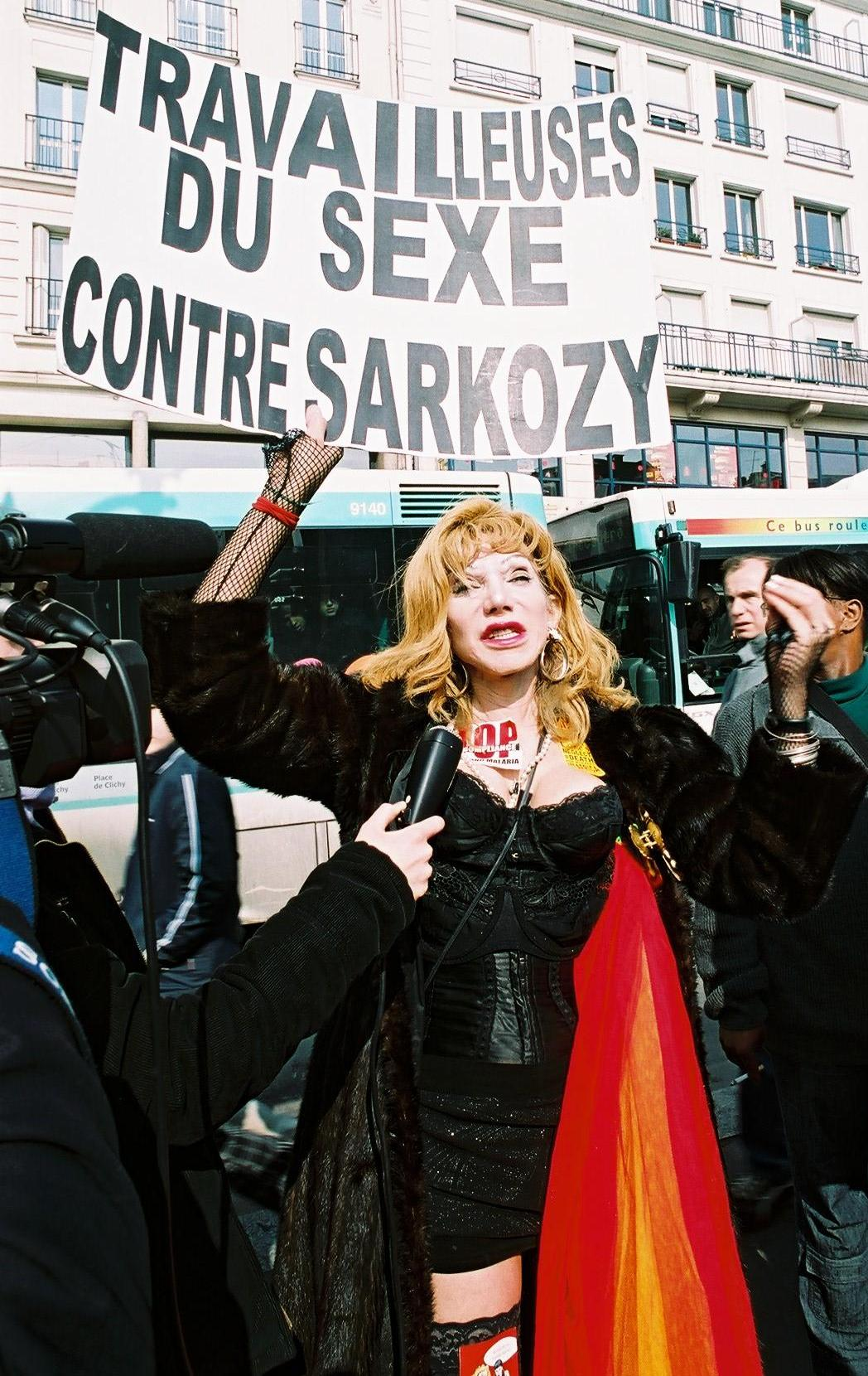 Dr. Camille Cabral, une Activiste des prostituées à la Pute Pride à Paris, France. Sur le panneau ; Travailleuses du sexe contre Sarkozy